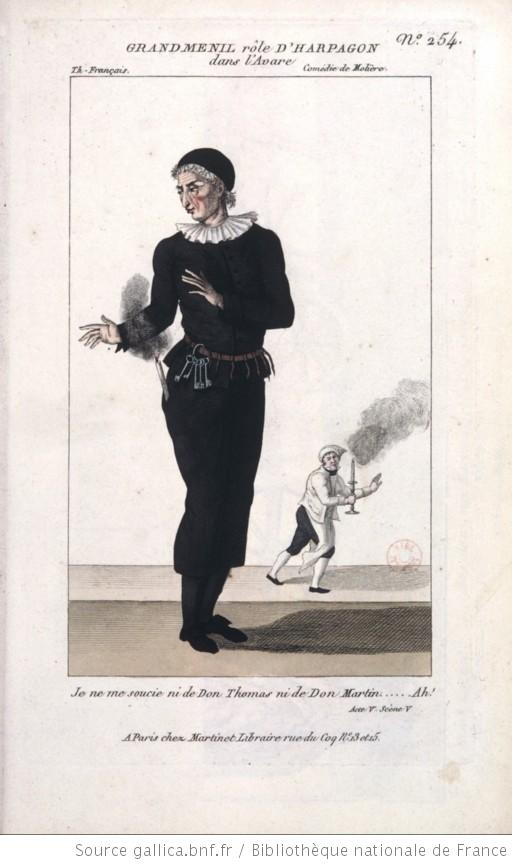 L'avare, comédie de Molière : costume de Grand-Ménil (Harpagon)